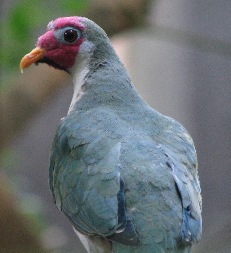 Jambu Fruit Dove (Ptilinopus jambu)